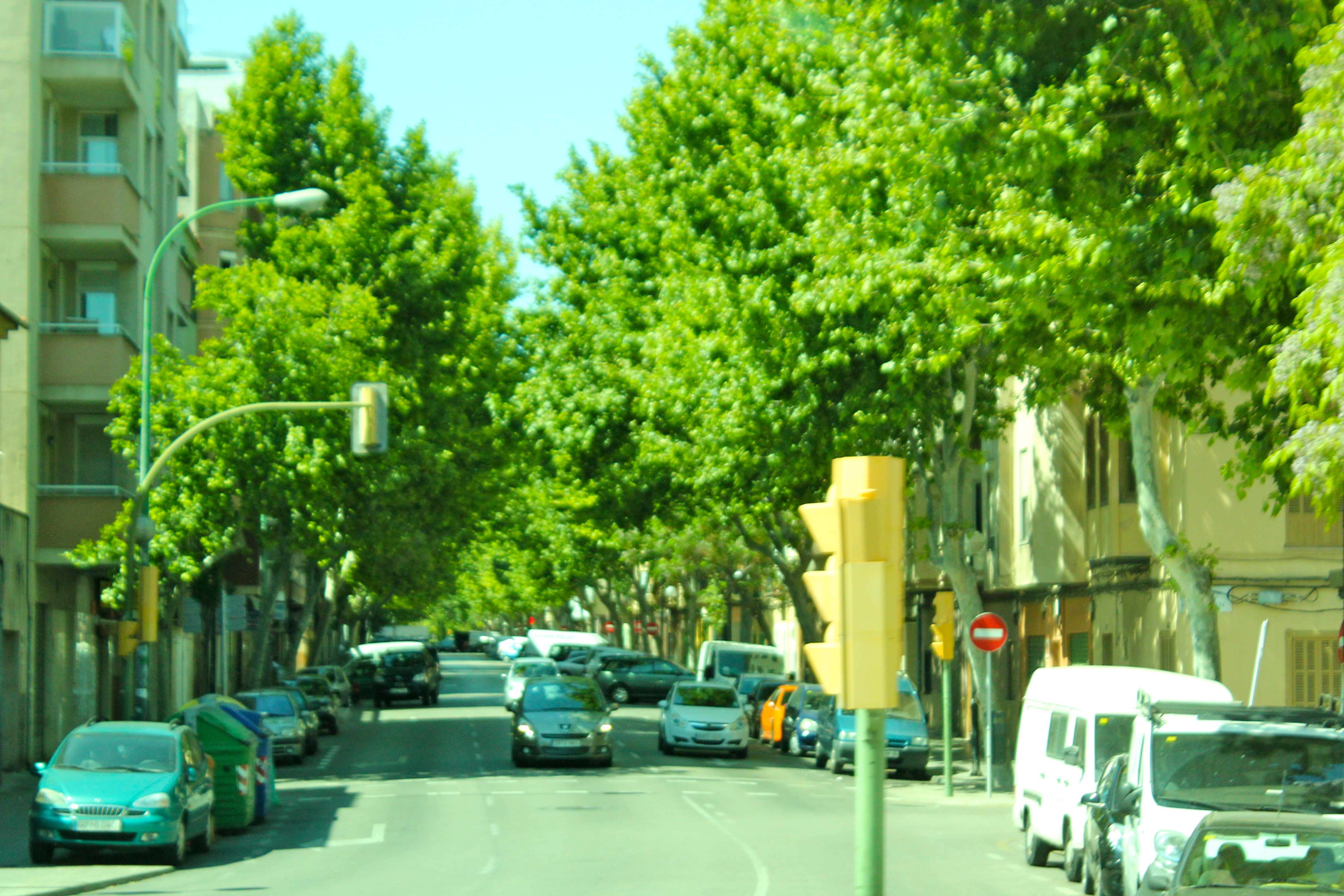 Carrer Reis Catòlics